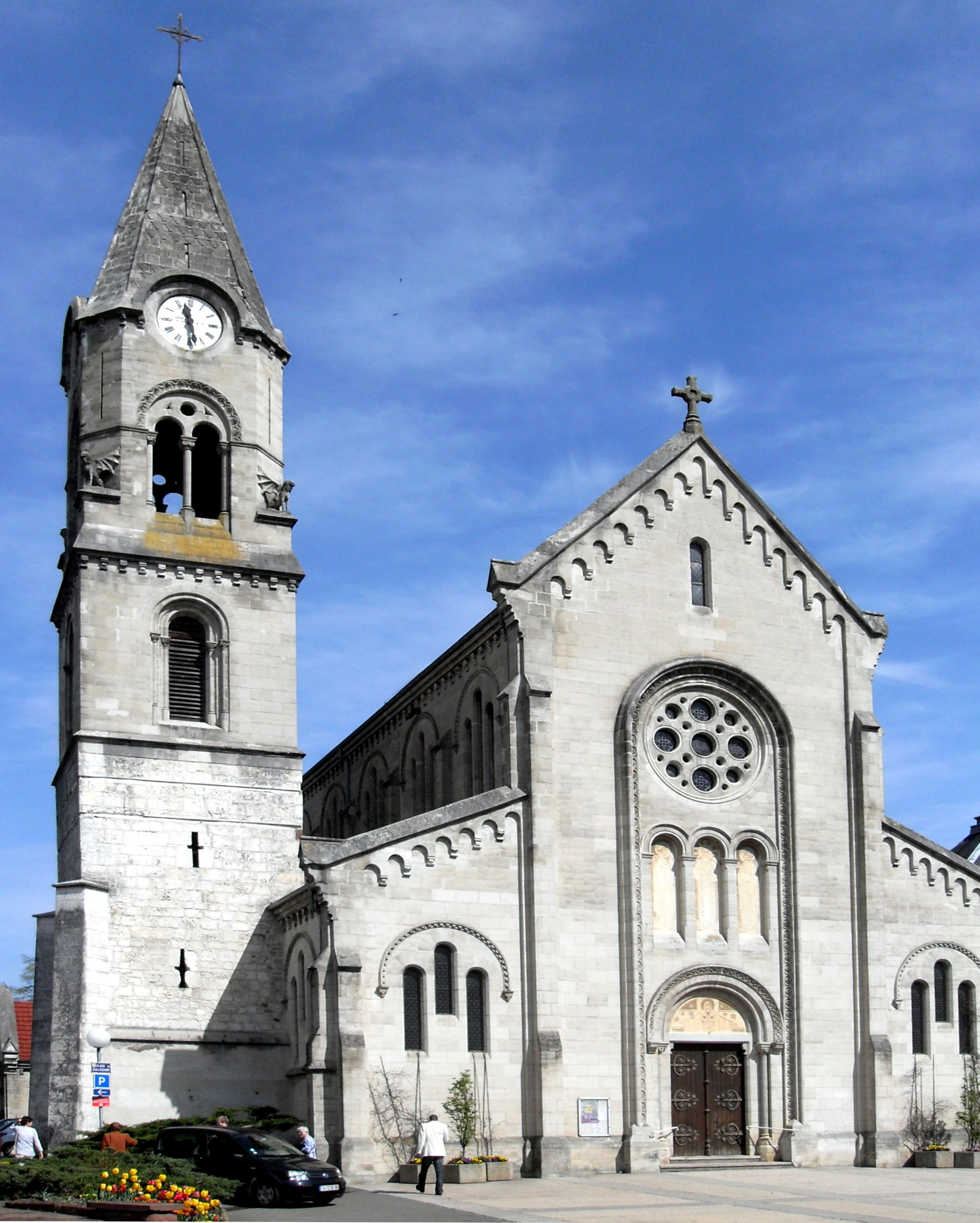 L'église Saint-Just à Danjoutin